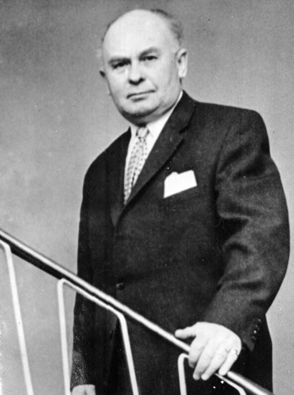 Zentralbild 6.4.1962 Dr. Hans Kroll Botschafter der Bundesrepublik in Moskau (7.3.1962)